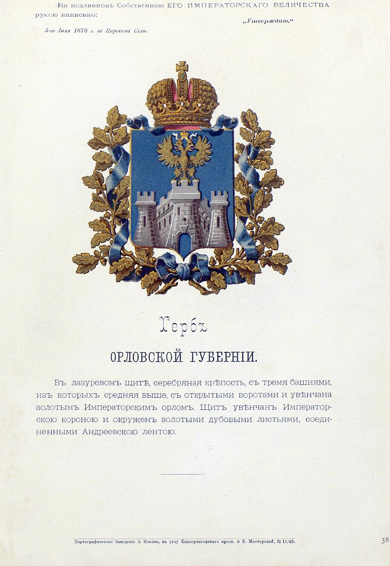 Official Russian Empire coat of arms Orel Governorate. Гласный герб Российской Империи Орловской губернии с официальным описанием в Гербовнике Бенке. Утверждён Императором Всероссийским Александром Вторым в 1878 году.